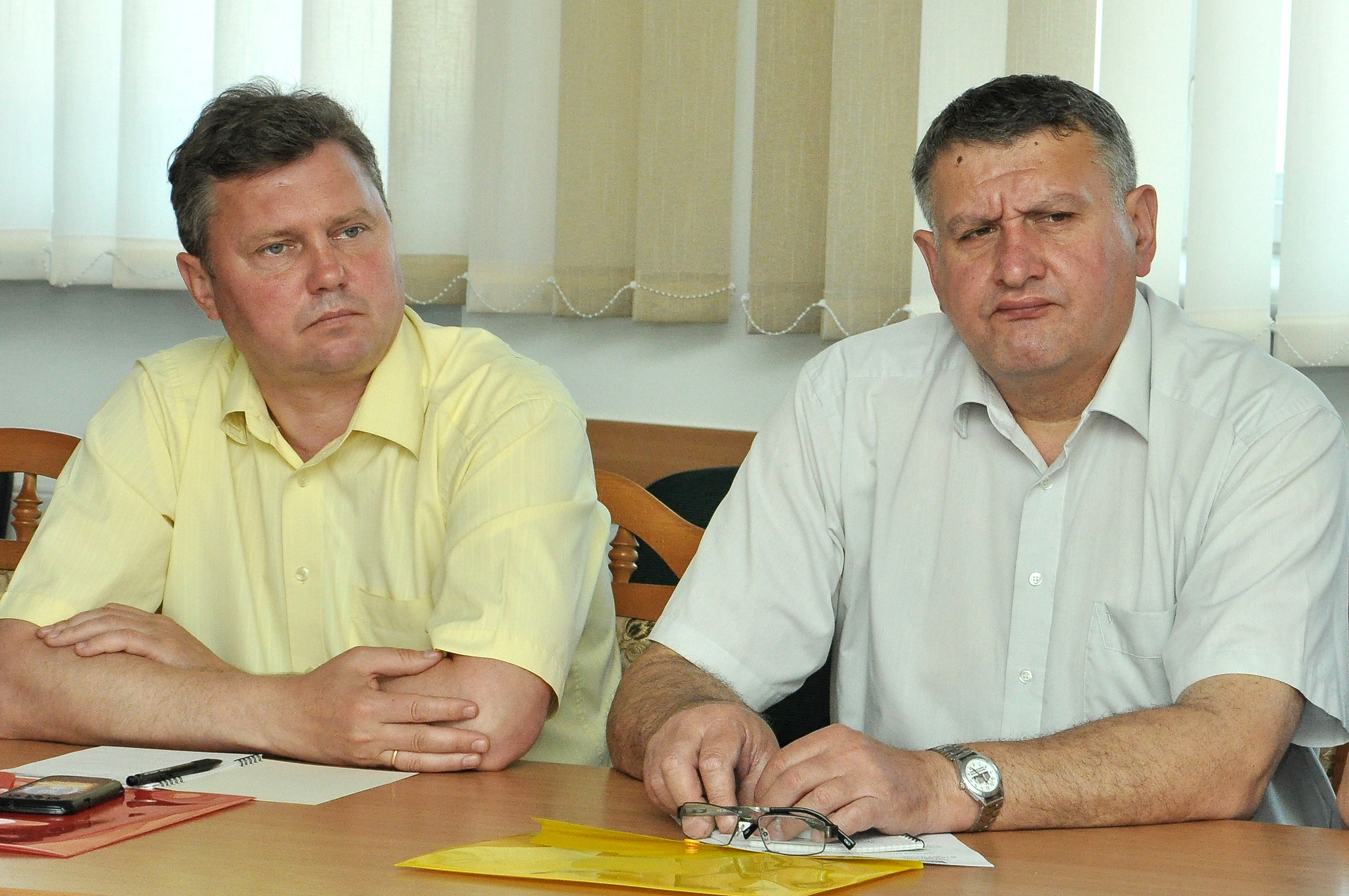 Засідання регіональної платформи розвитку місцевого самоврядування, яке відбулося 26 травня 2016 року в Центрі Євростудій Тернопільського національного економічного університету. На світлині: невідомий і голова Великобірківської селищної ради Роман Мацелюх.